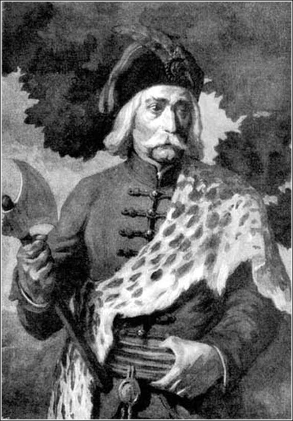 Bottyán János kuruc hadvezér